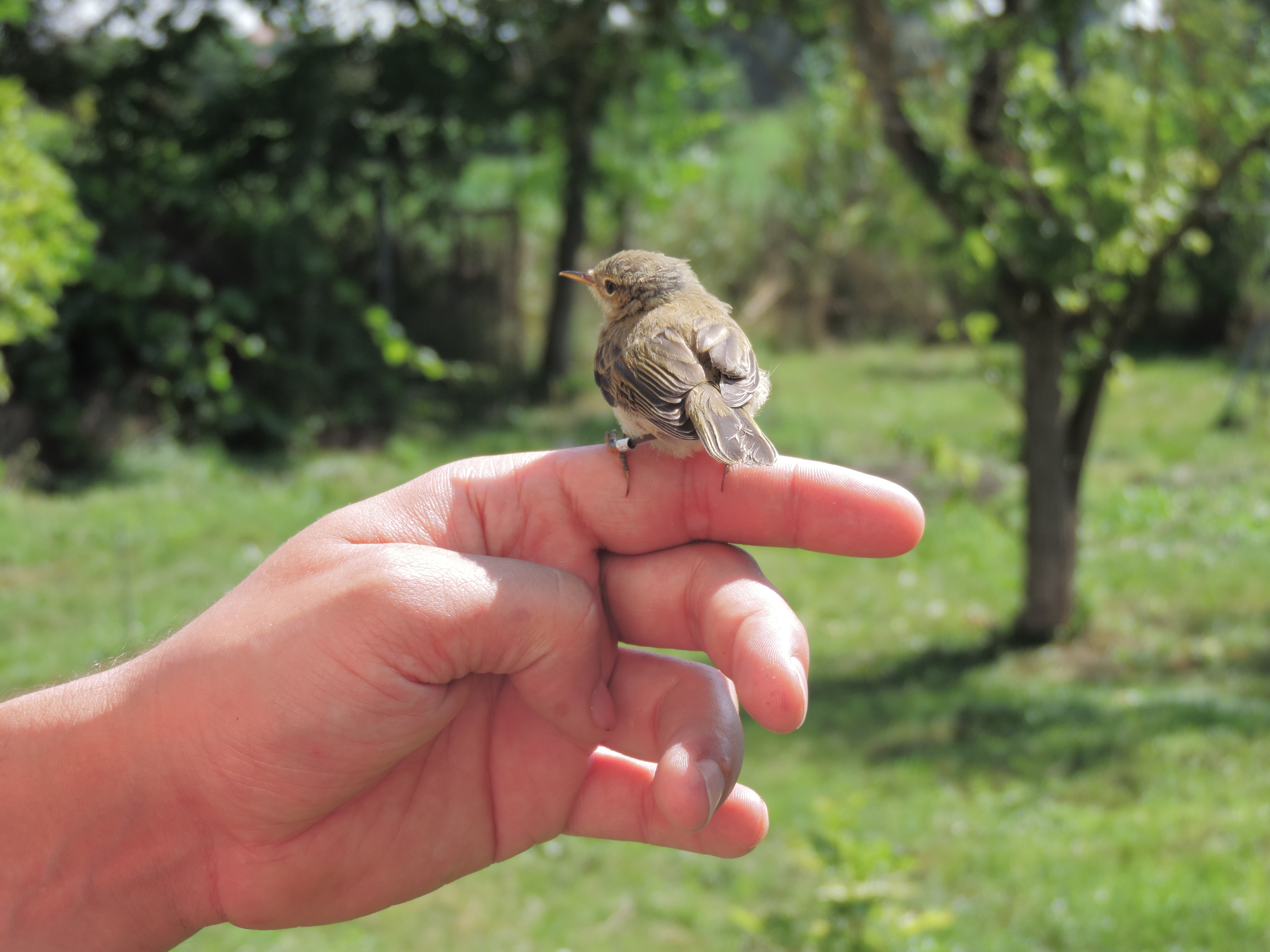 Prise à Ócsa, Hongrie